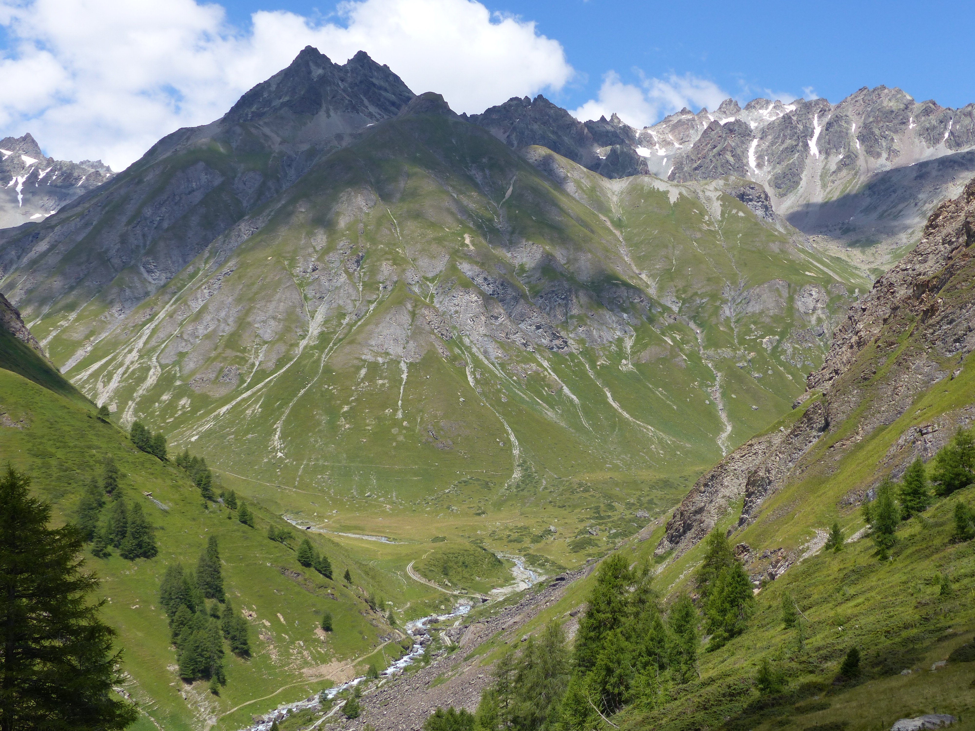 Zusammenfluss von Aua d'Urezzas und Tasnan